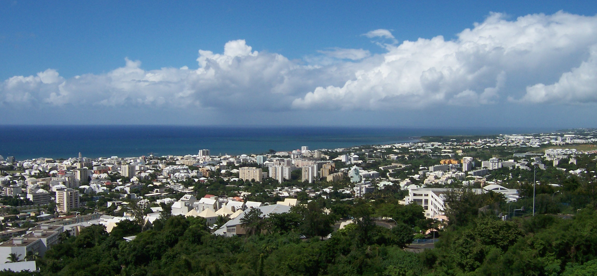 Saint-Denis de la Réunion general view taken from Bellepierre Photo : B.navez - 23 MAR 2006 - Réunion island